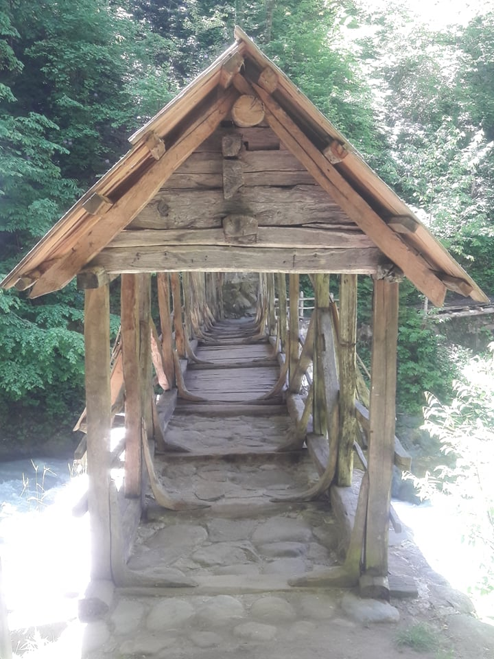 აჭარაში შუა საუკუნეებში ფათრთოდ გავრცელებული კონსოლურ-კოჭოვანი დახურული ხიდების ერთადერთი შემორჩენილი ნიმუშია